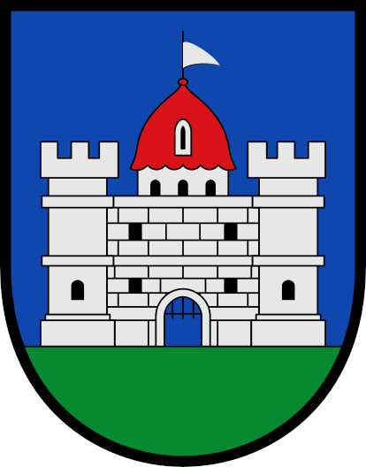 Wappen der Gemeinde Obdach (bis 2014)